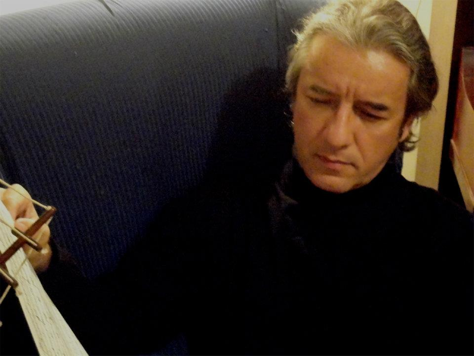 André Lamounier